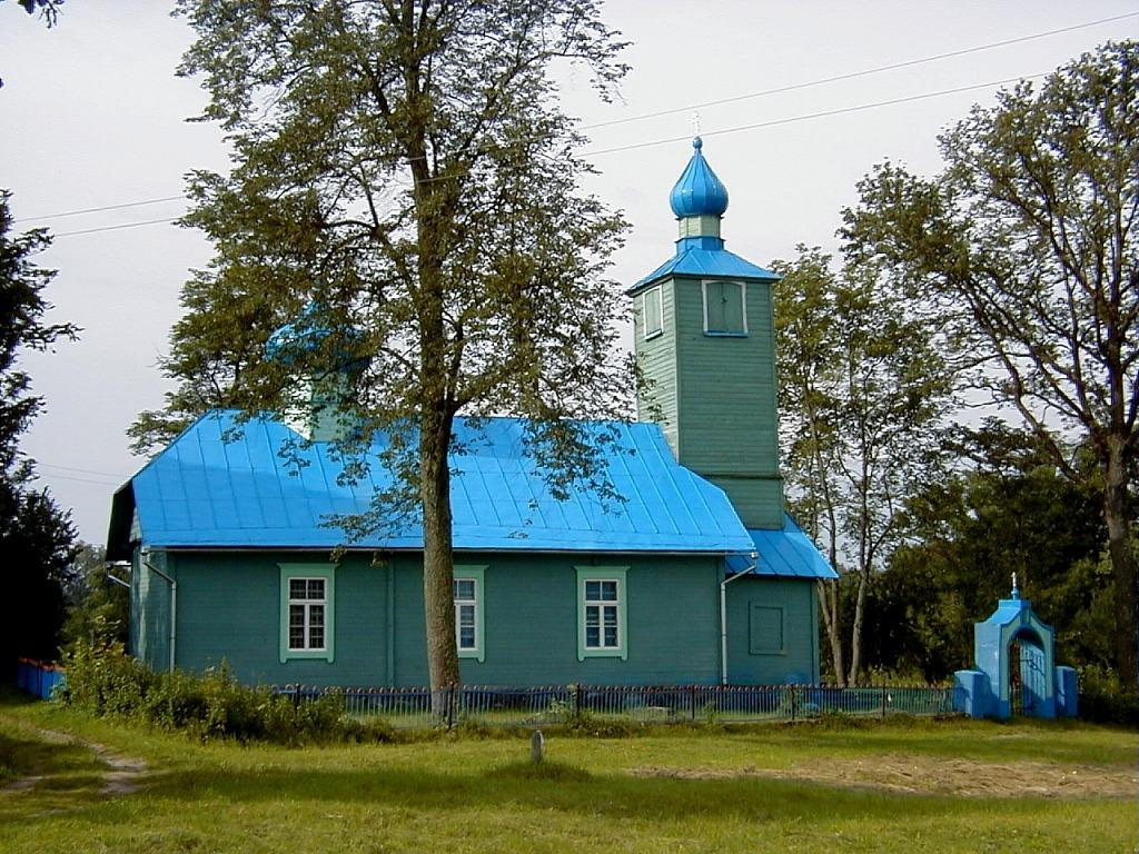 Kovaļovas baznīca. 2000-07-22